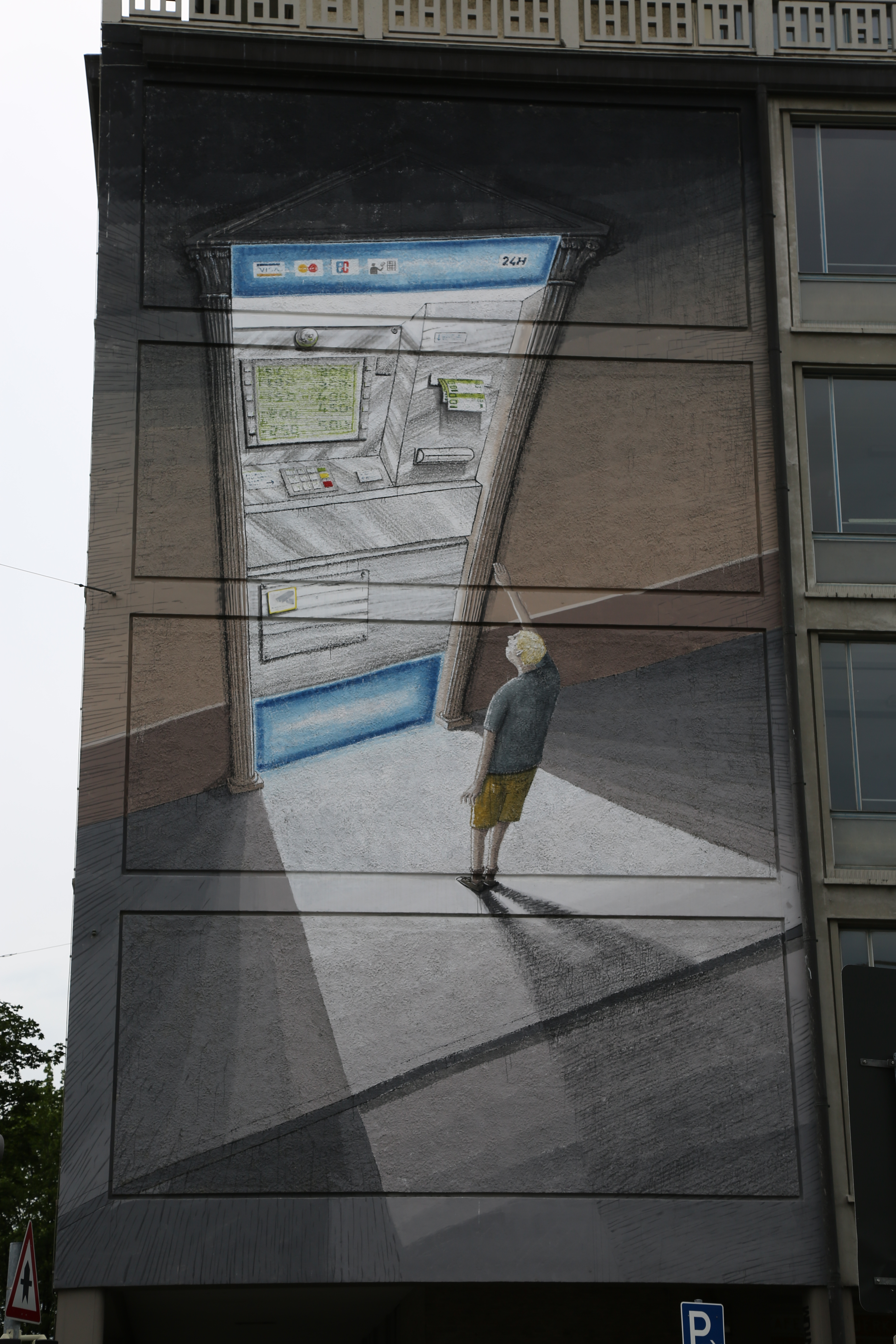 Mural in Munich, showing an ATM with a small boy giving the Hitler Salute to the money mashine. At the corner Karlstrasse, Luisenstrasse. made by street artist Blu, on invitation by positive propaganda